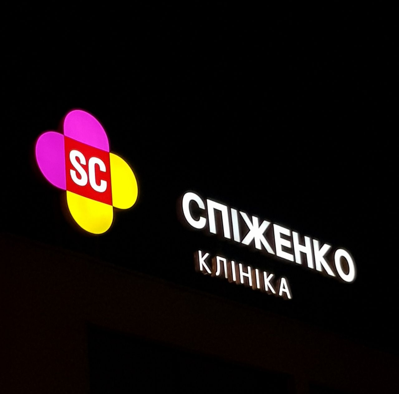 Клініка Спіженко, с. Капітанівка, Київська область. Онкологічний центр повного циклу послуг